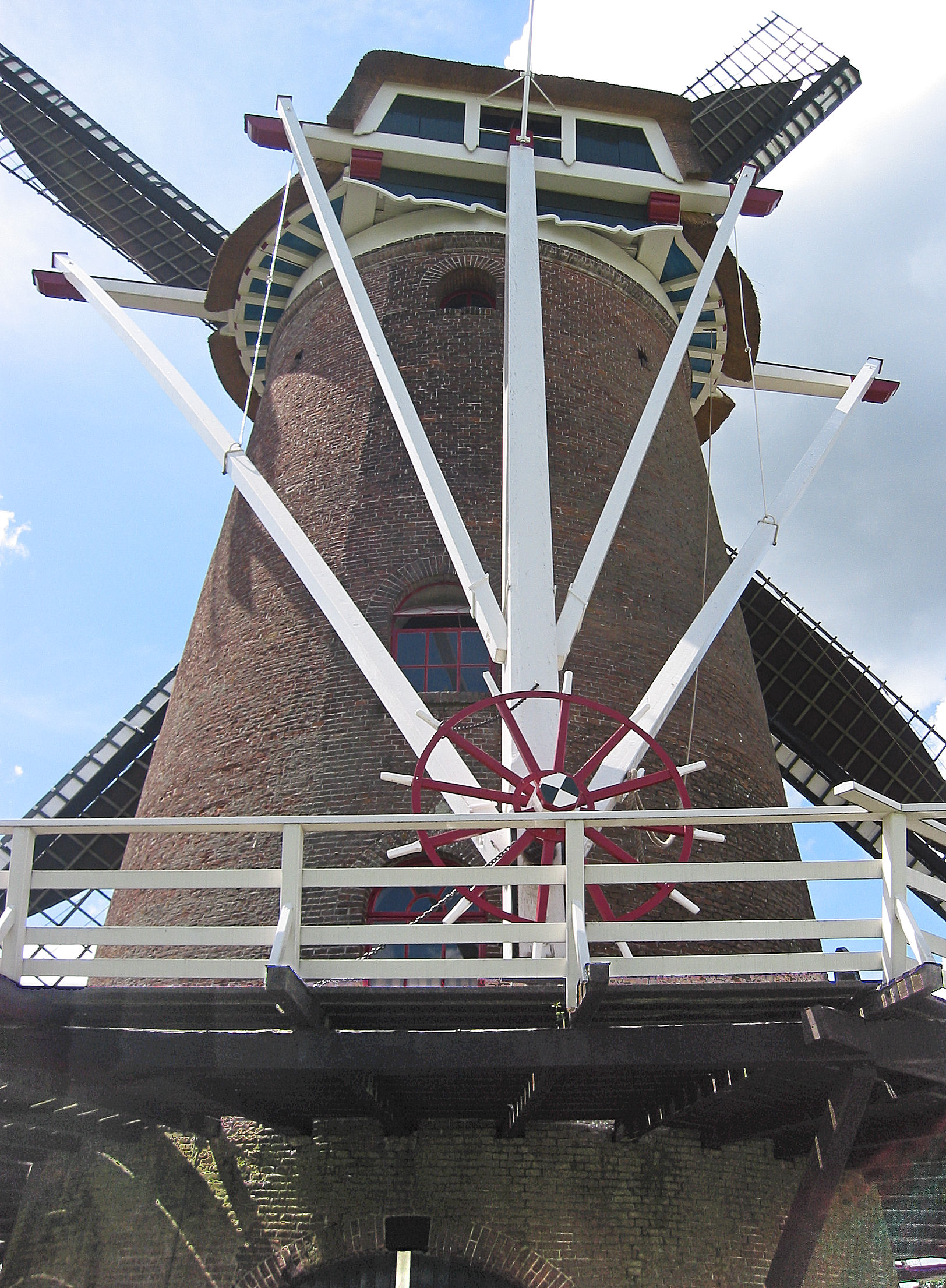 Staart van De Hoop in Garderen, Gelderland, the Netherlands